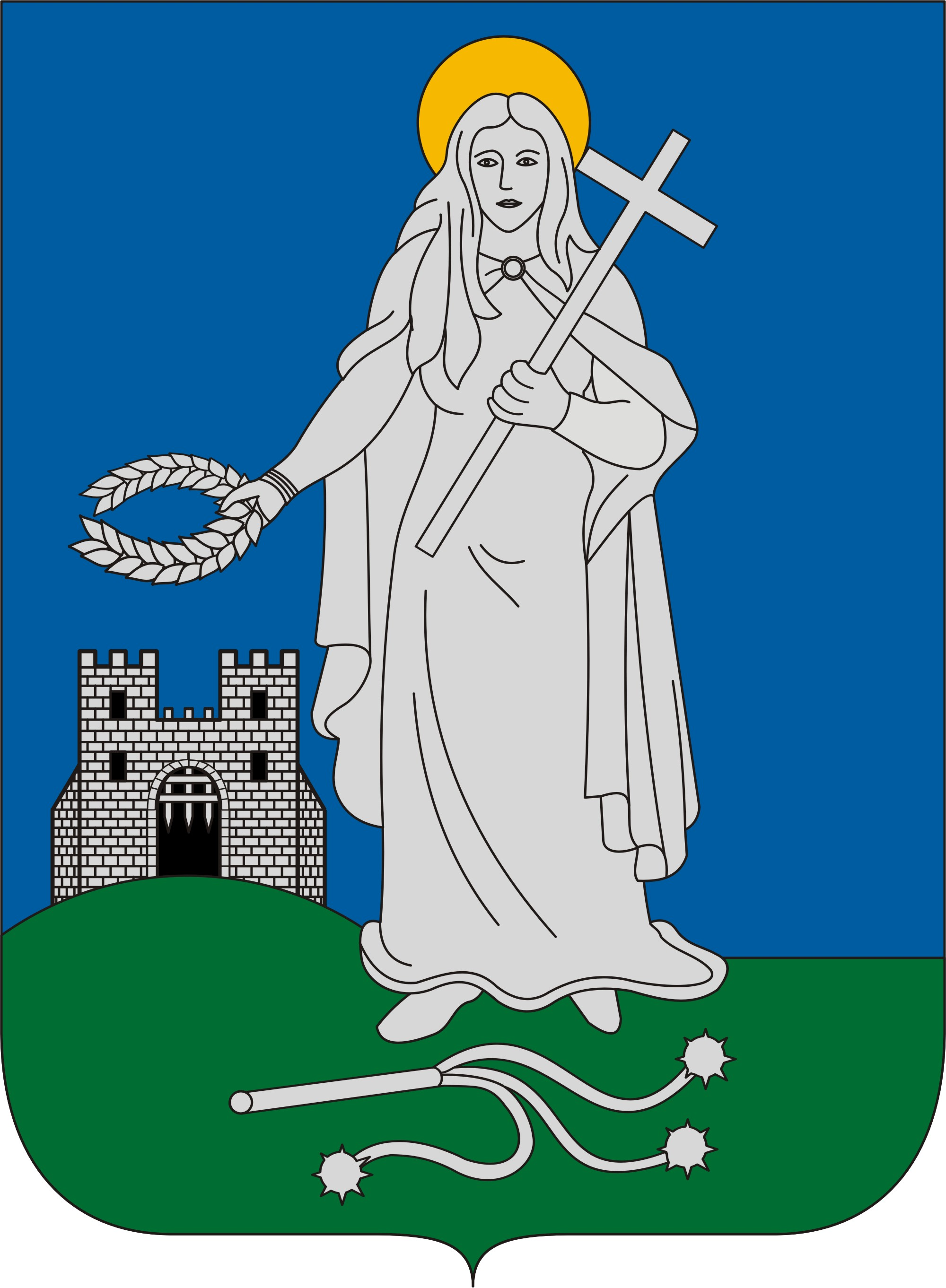 Zalaegerszeg címere